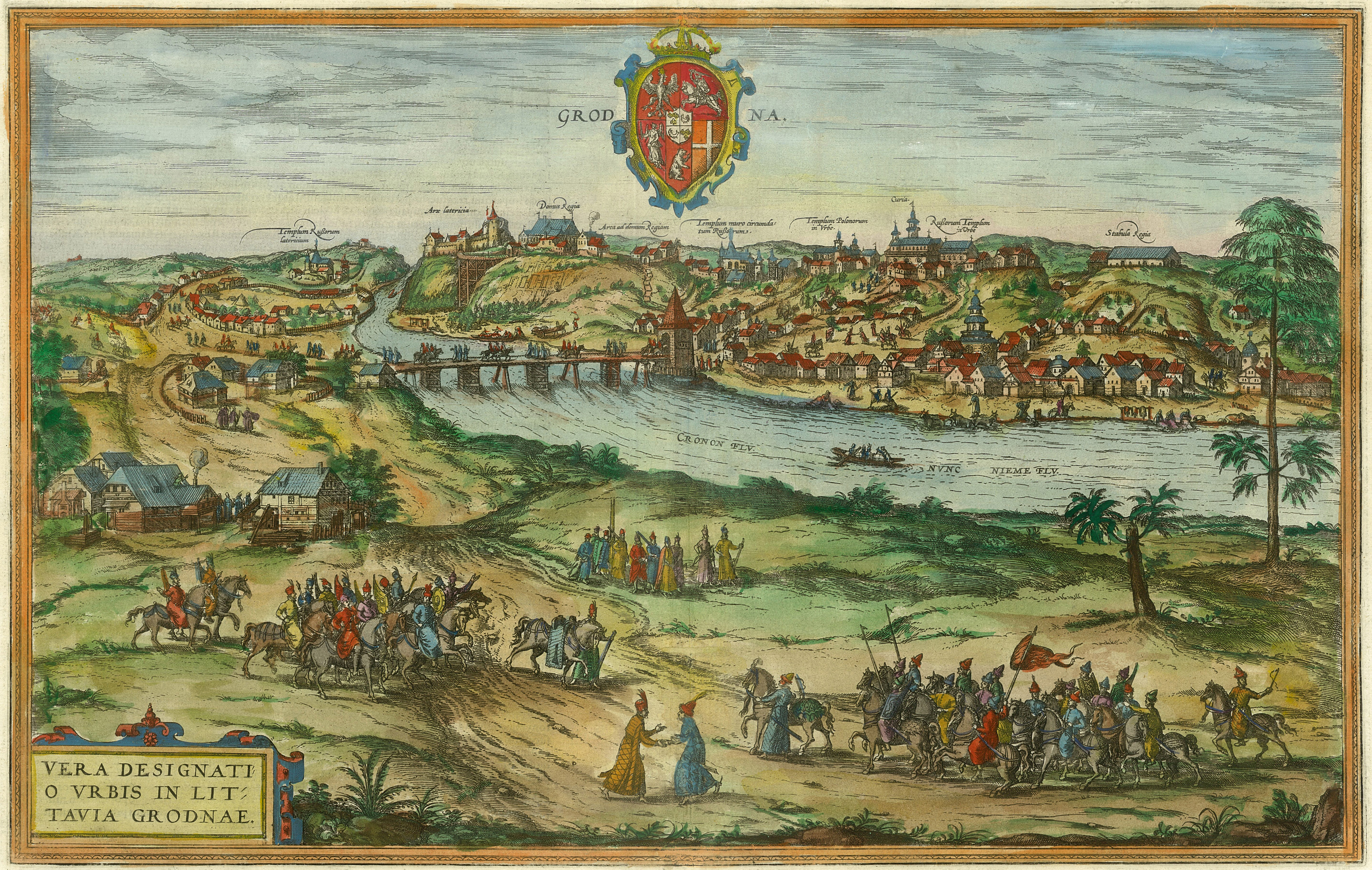 Беларуская (тарашкевіца): Горадня (Horadnia). Гравюра